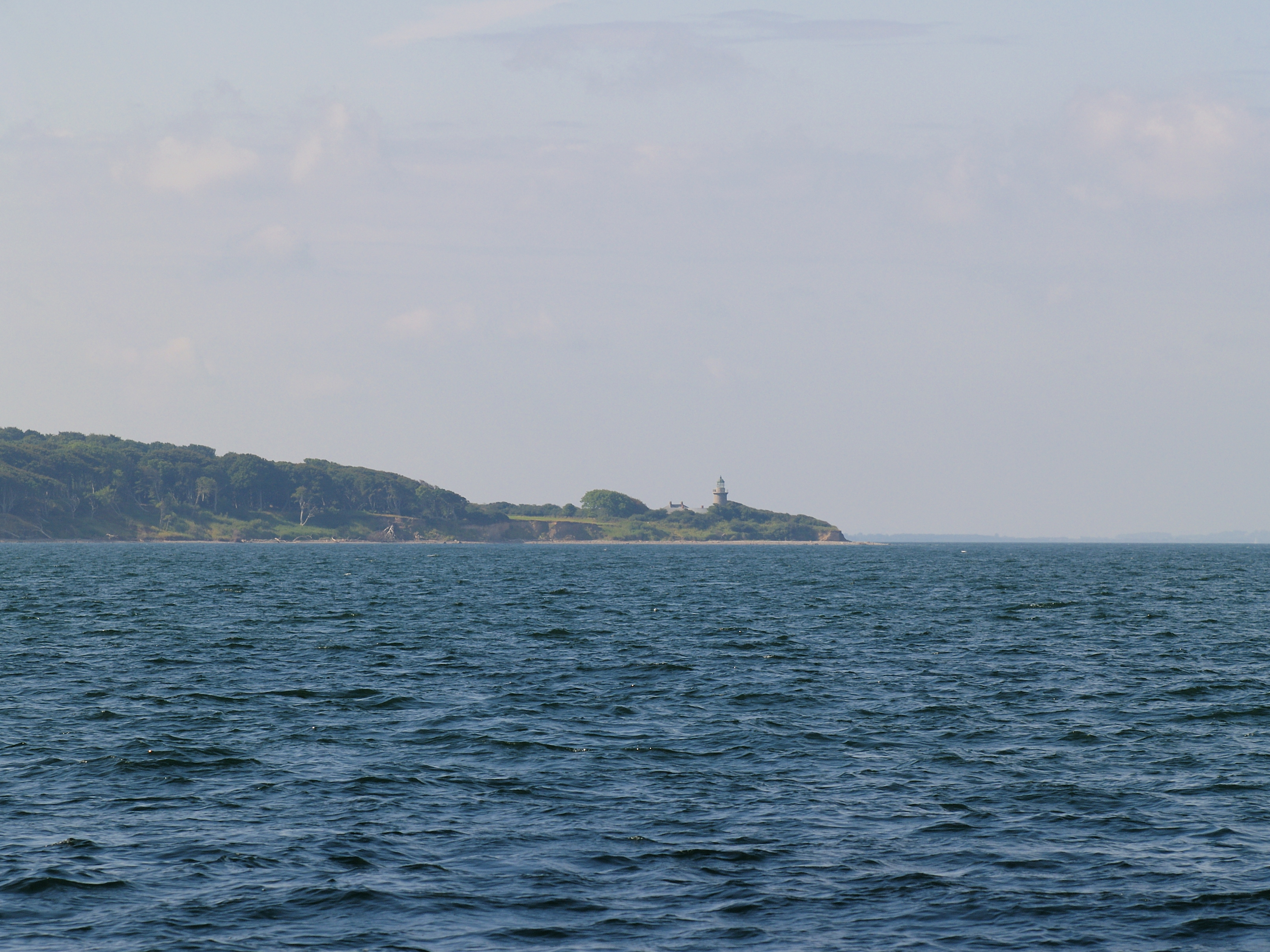 Leuchtturm Æbelø Fyr an der Nordspitze der Insel Æbelø (=Apfelinsel), einer kleinen Insel nördlich Fünen im Kattegat, Dänemark